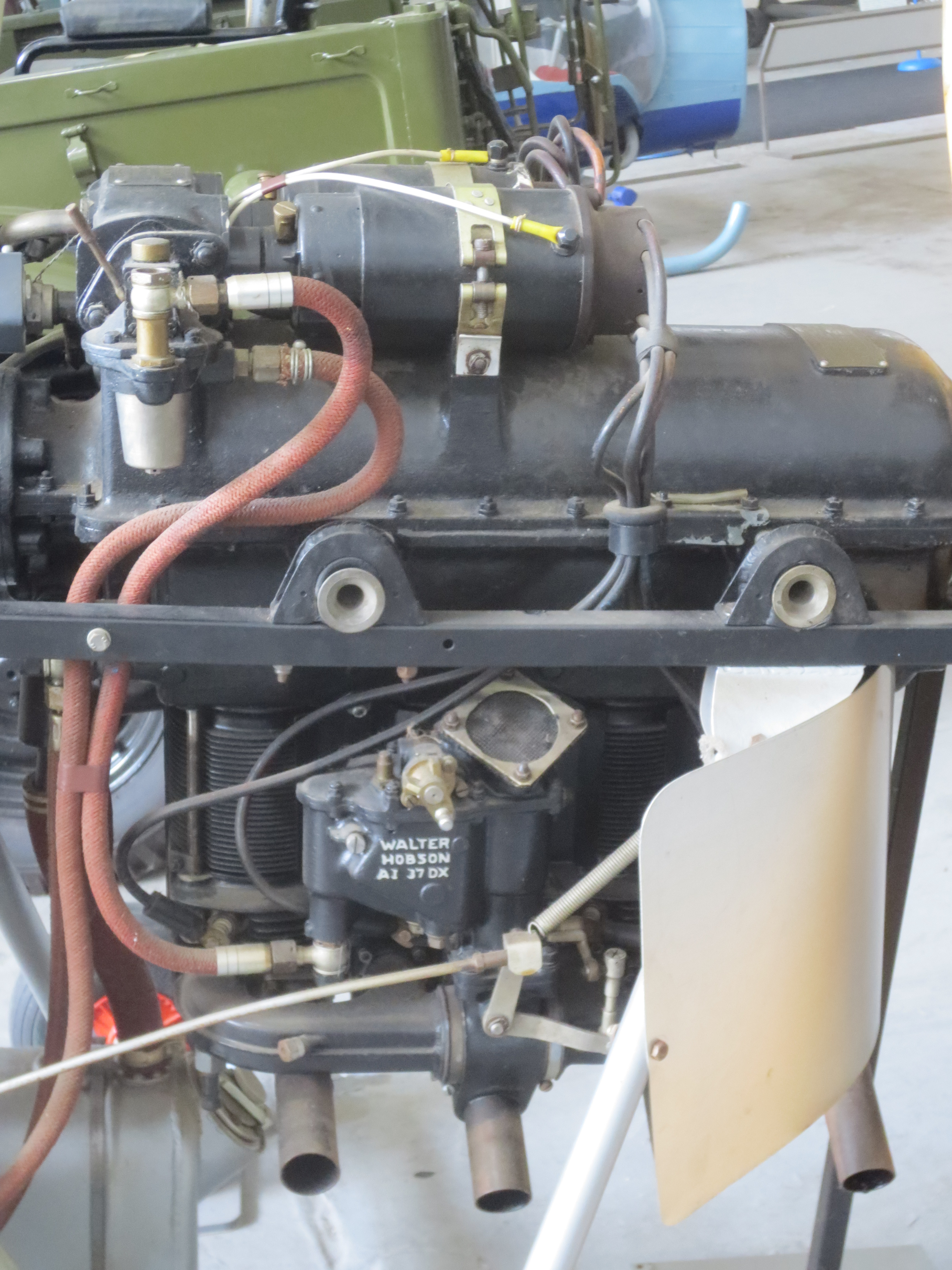 Vírník KD-67 Ideal s motorem Walter Mikron II, LM Kbely